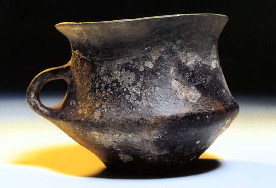 naczynie unietyckie z obszarow Czech, autor zdjecia nieznany